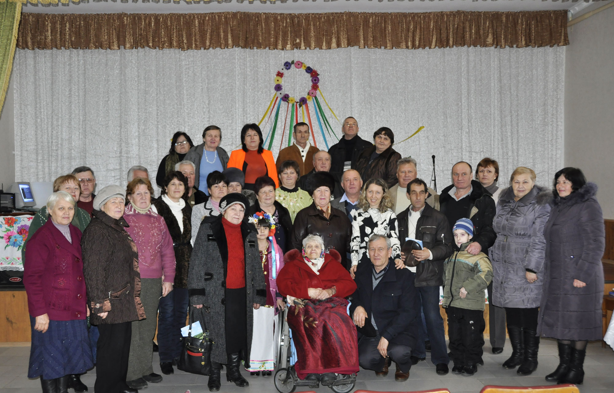 Село Марьевка. Презентация книги о Марьевке